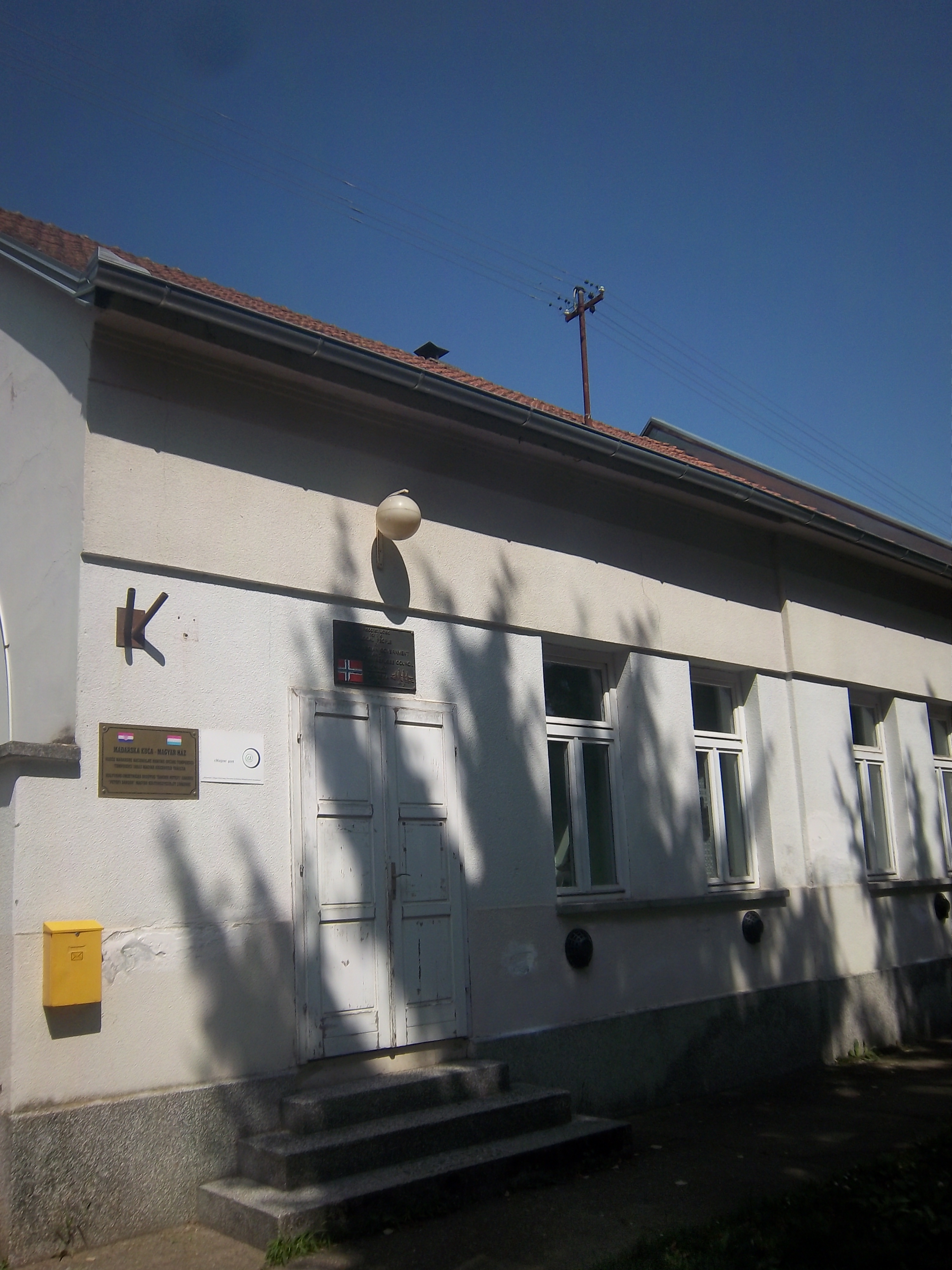 Srpskohrvatski / српскохрватски: Mađarska kuća u naselju Čakovci u Općini Tompojevci u Vukovarsko-srijemskoj županiji (Republika Hrvatska).